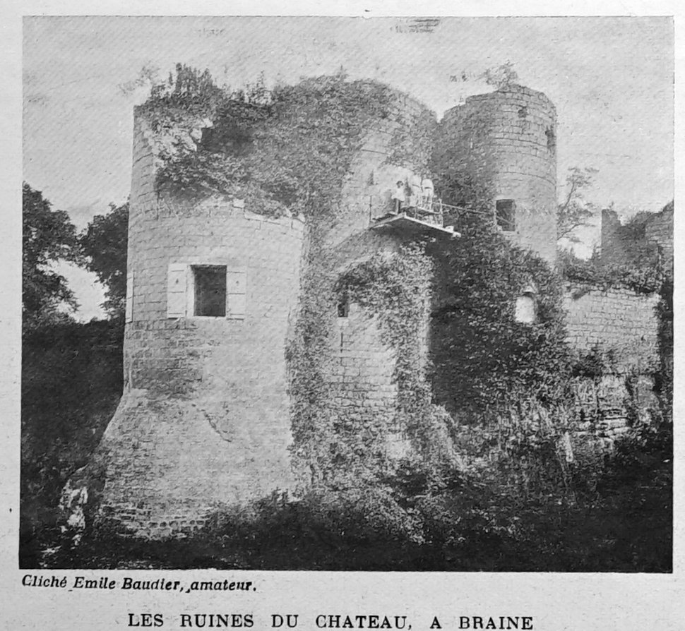 publié dans le "Bulletin de l'œuvre des voyages scolaires".